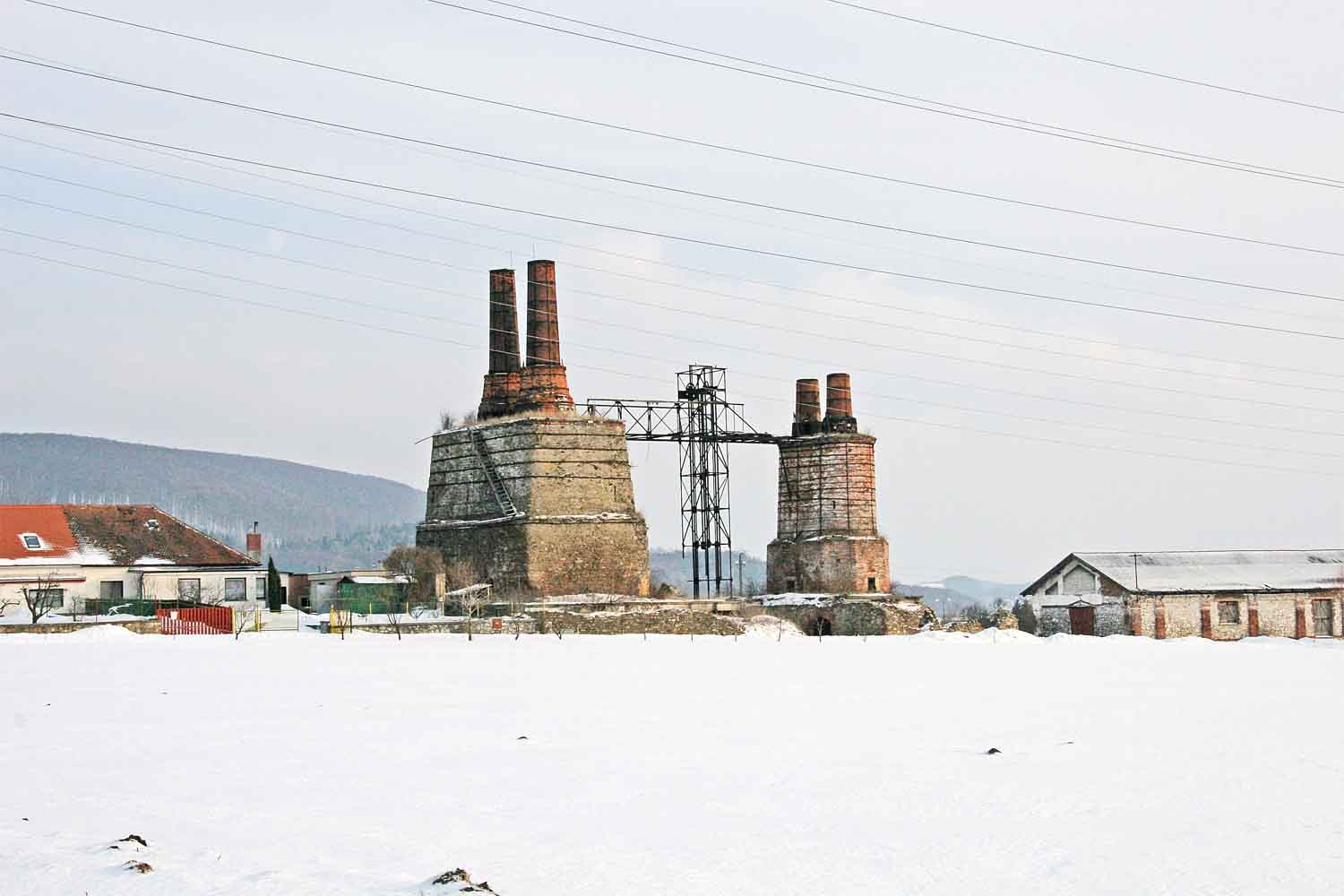 Technická památka - Berlova vápenka v Závratci